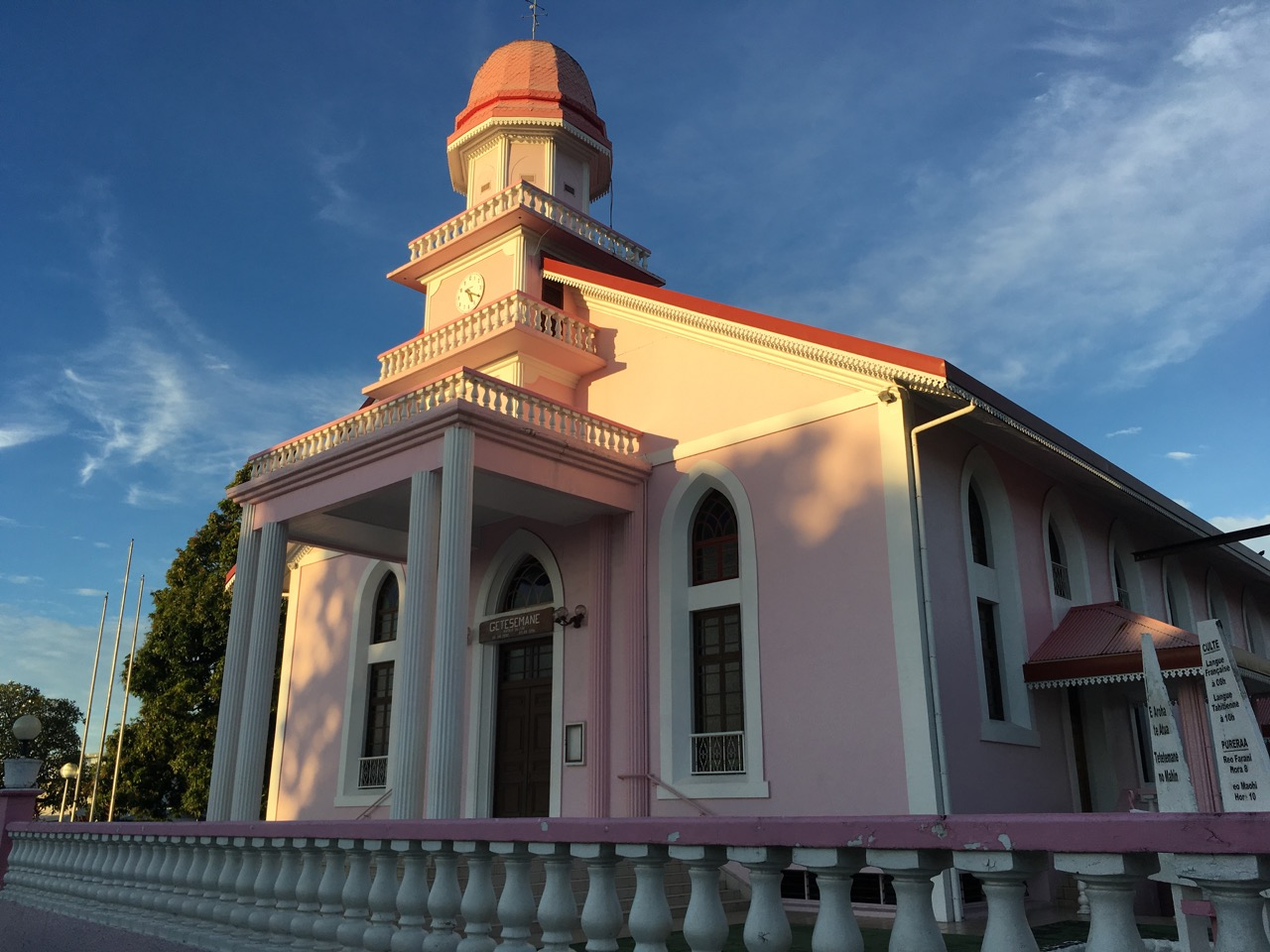 Temple protestant de Getsemane